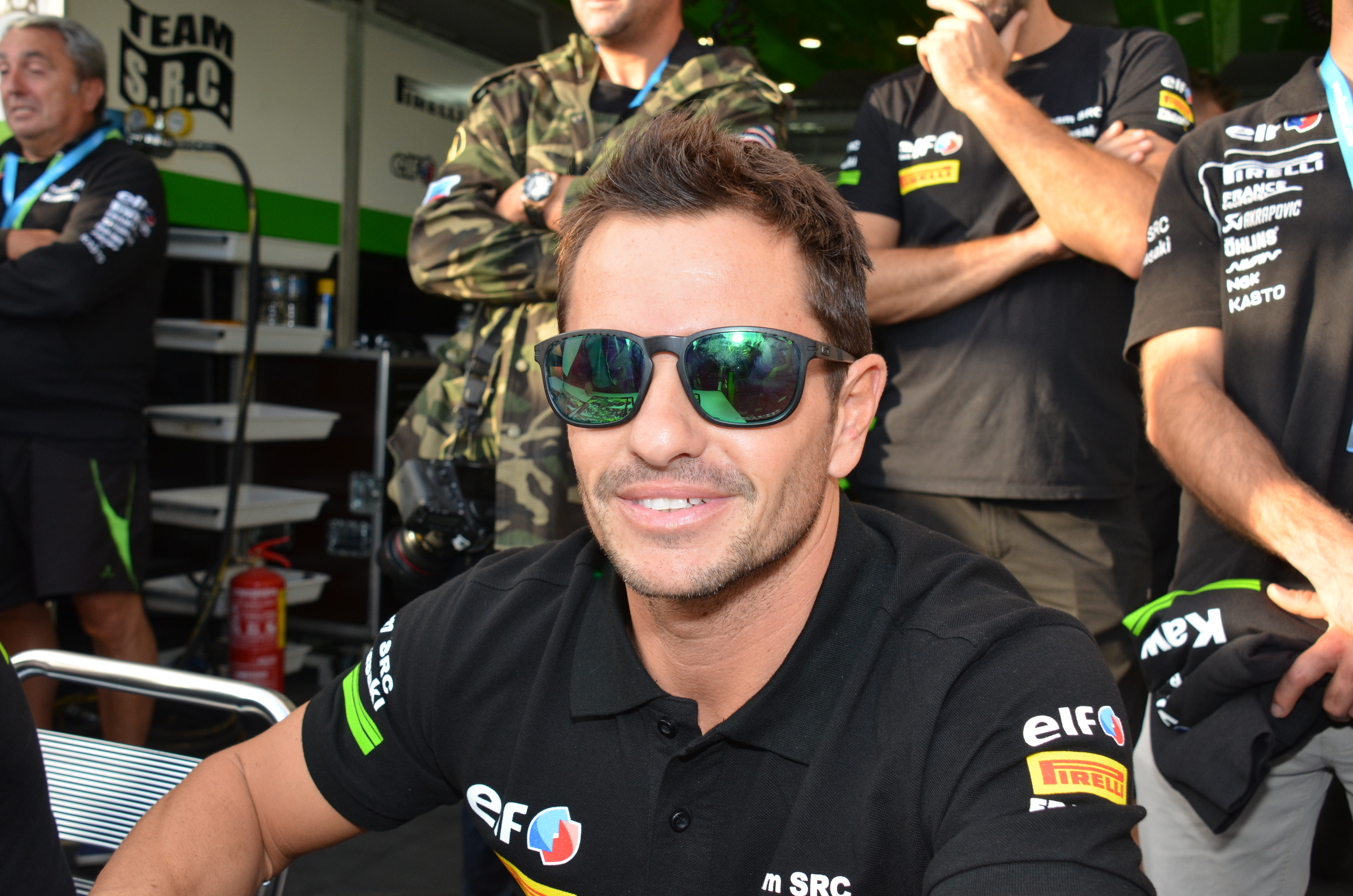 Randy De Puniet au Bol d'Or 2016